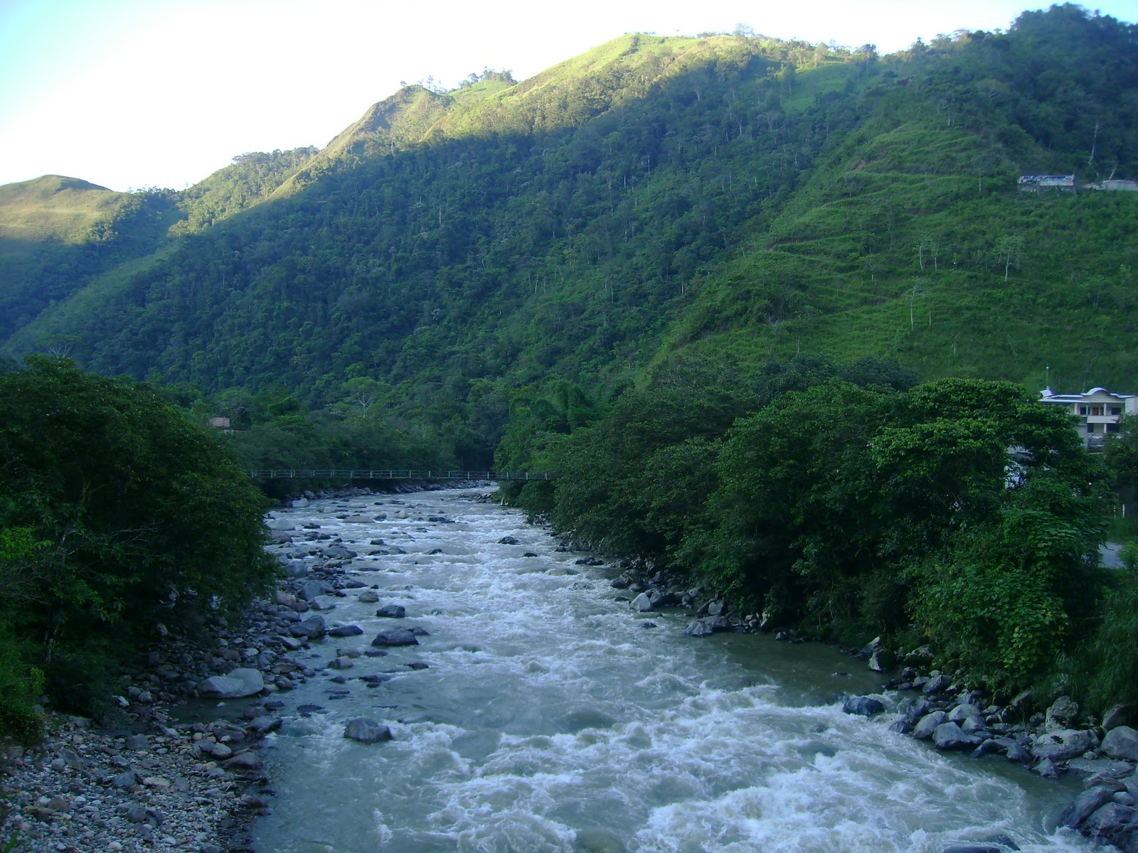 El Rio Santa Rosa en 2017